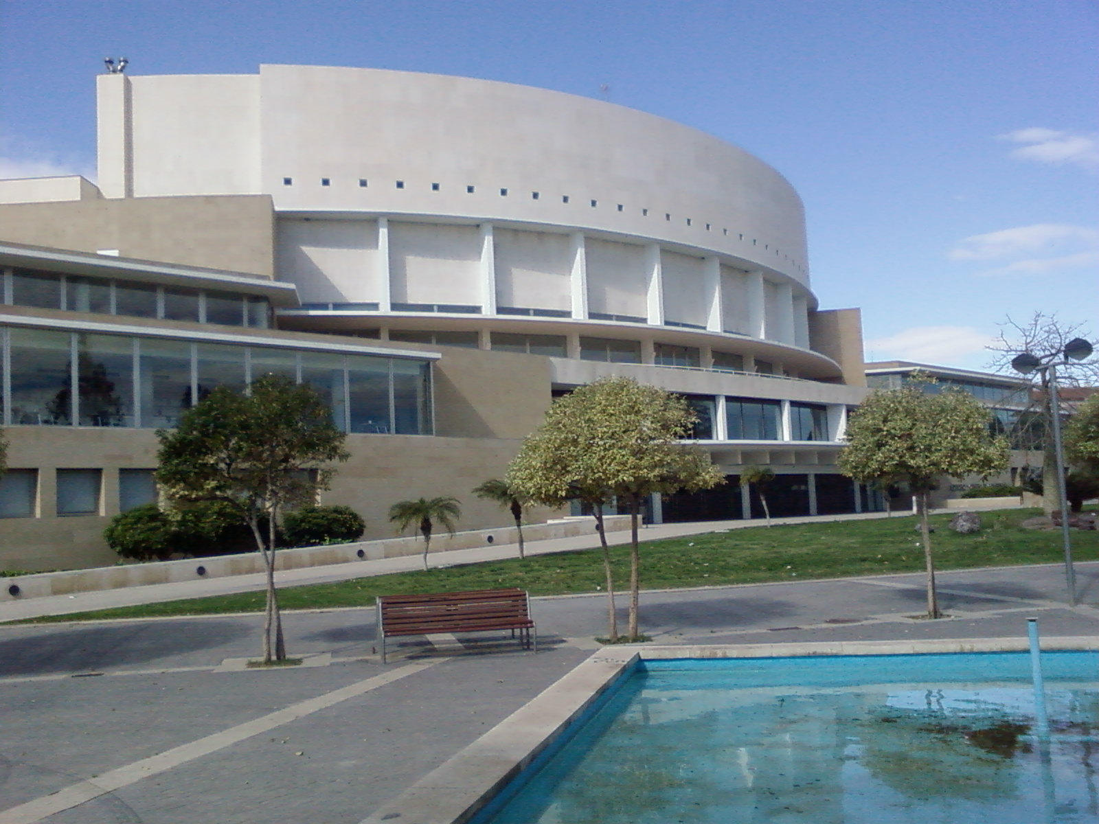 auditorio y centro de congresos victor villegas